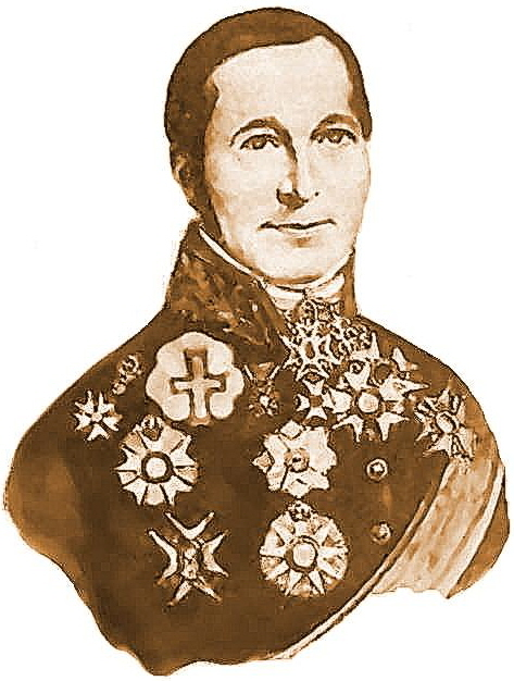 Félix de Muelenaere